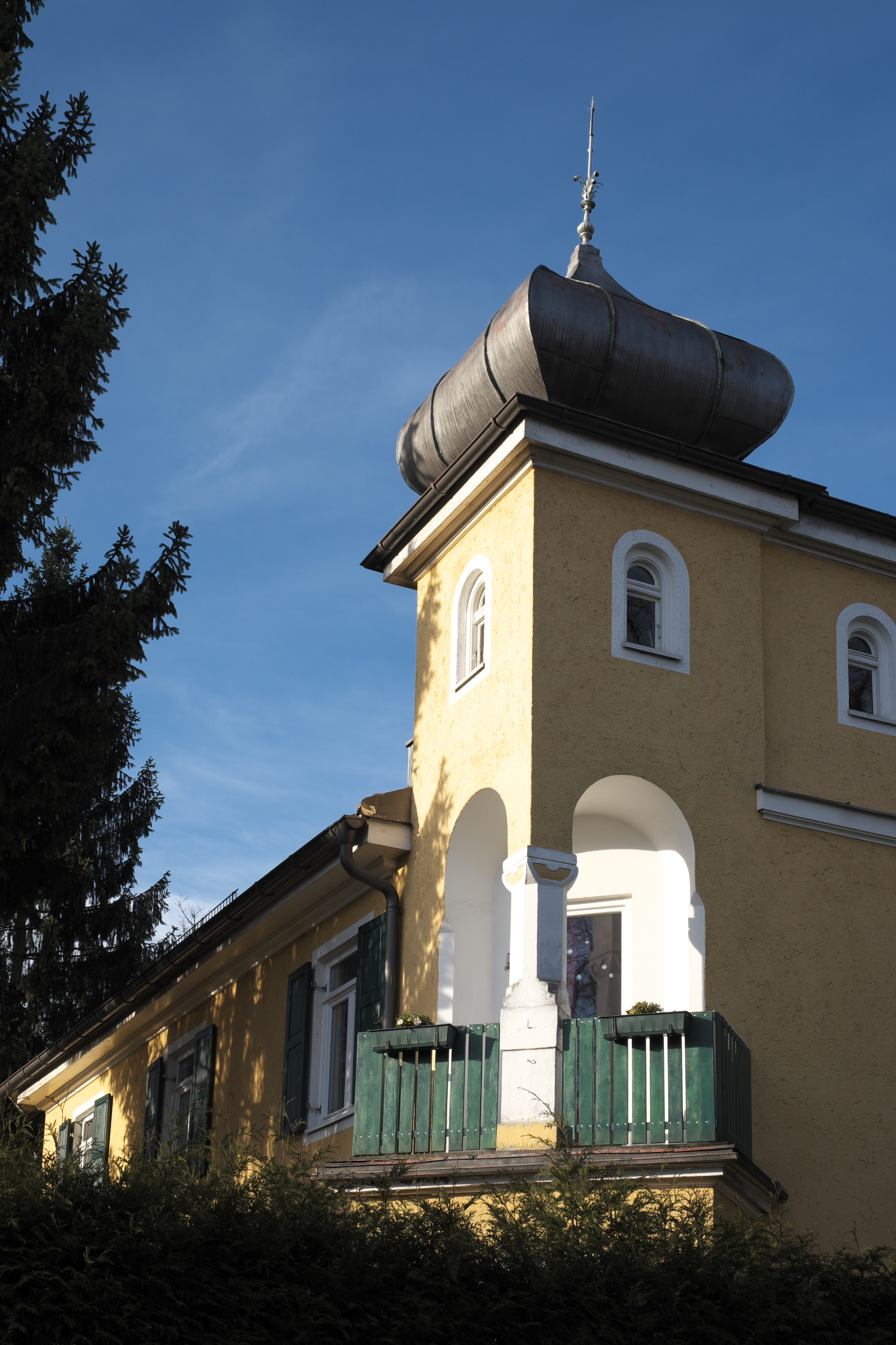 Villa in der Alten Allee 17 in Obermenzing im Stadtbezirk Pasing-Obermenzing in München (Bayern/Deutschland), 1897 erbaut